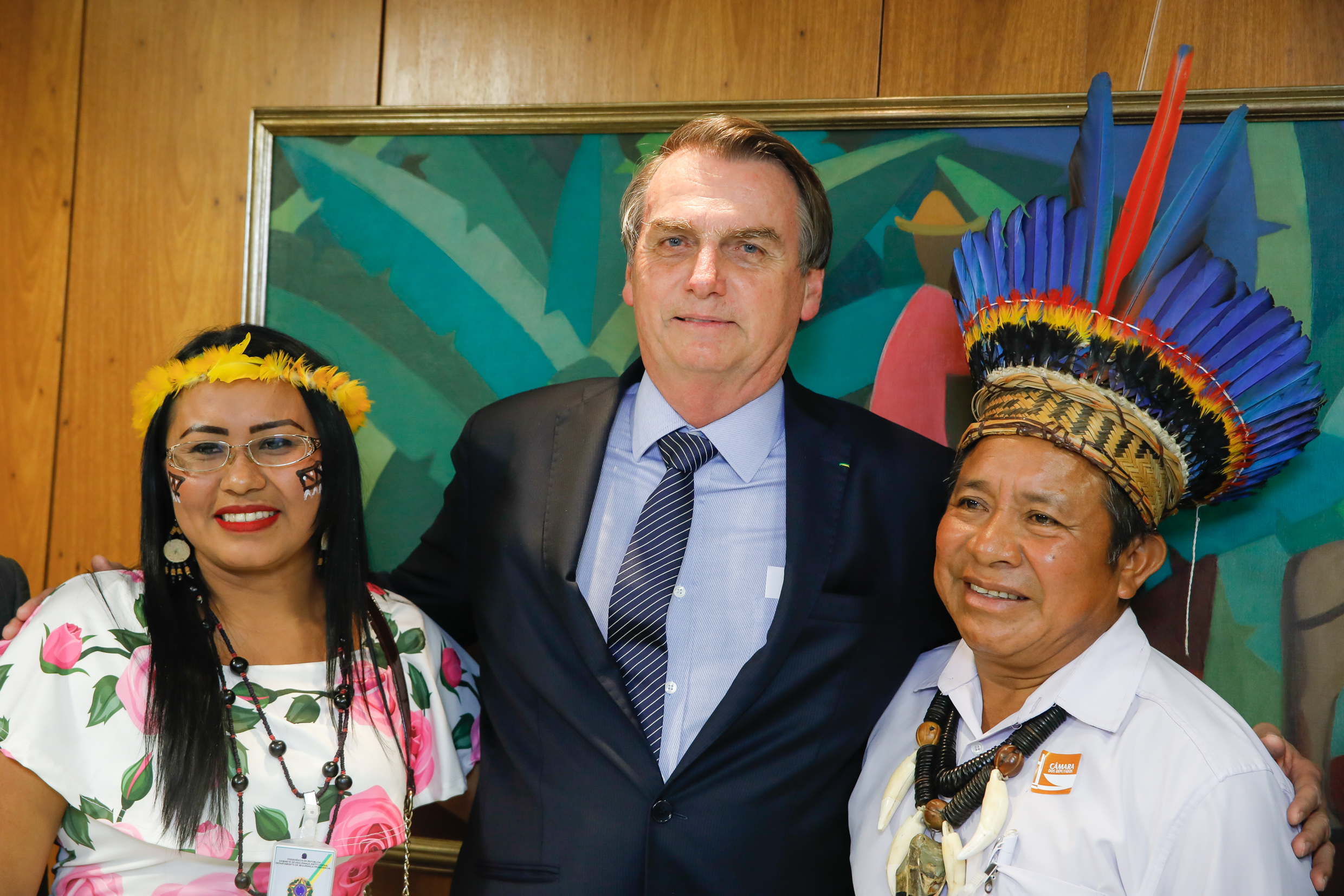 (Brasília - DF 17/04/2019) Presidente da República, Jair Bolsonaro durante transmissão de live direitos dos povos indígenas para redes sociais.Foto: Carolina Antunes/PR